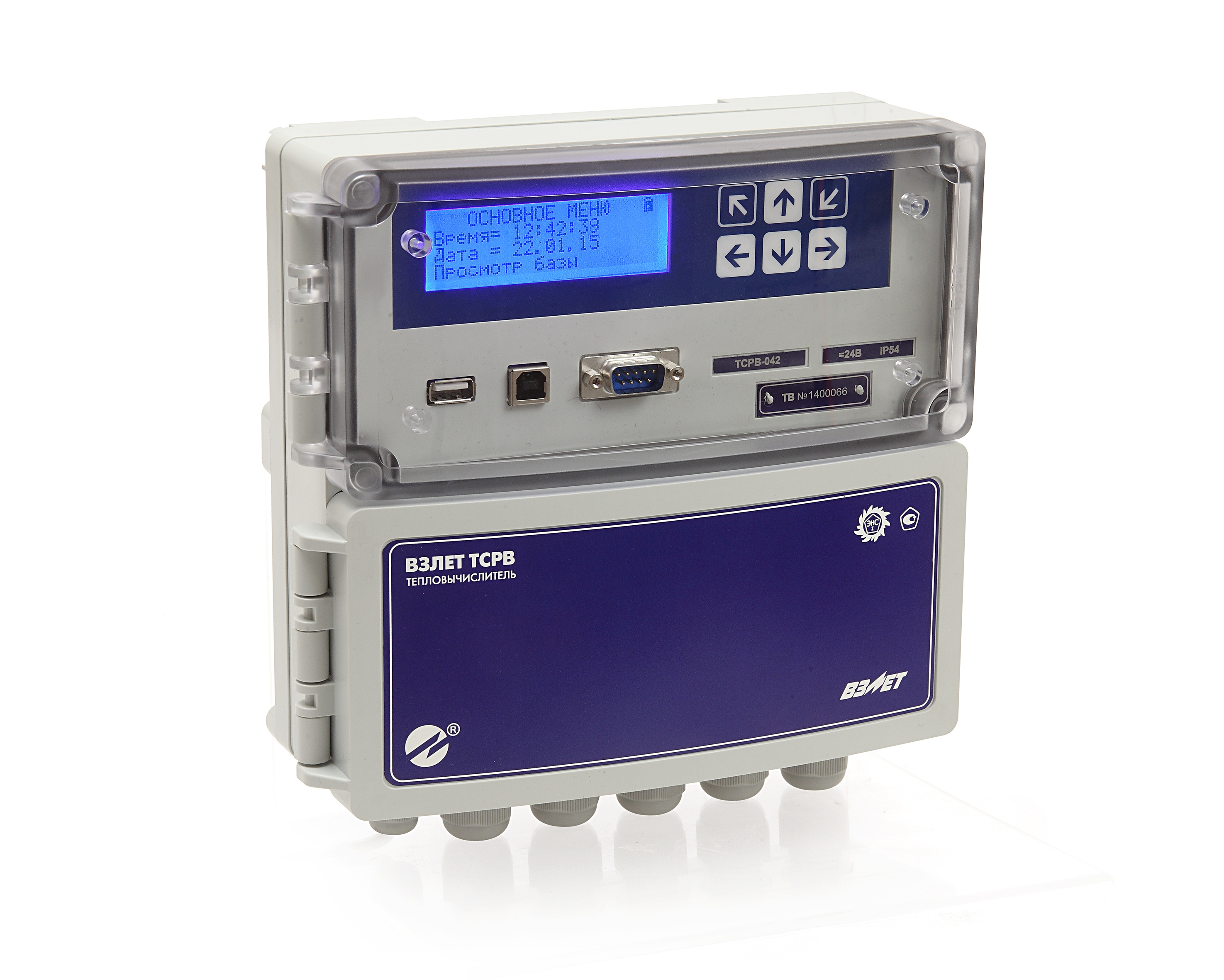 Тепловычислитель Взлет ТСРВ-042